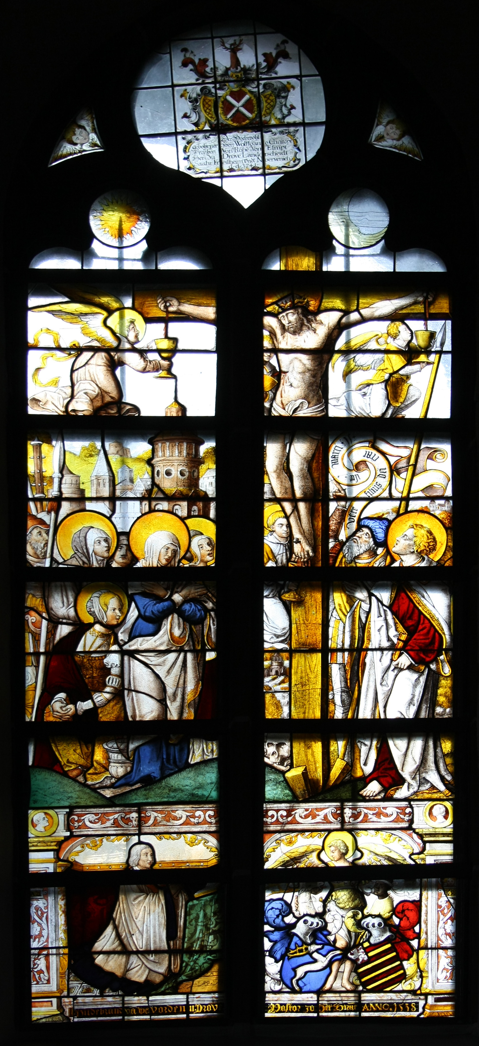 Bleiglasfenster in der katholischen Pfarrkirche St. Martin in Drove, Zitat aus Heinrich Oidtmann: Die rheinischen Glasmalereien vom 12. bis zum 16. Jahrhundert. Bd. 2, Schwann Verlag, Düsseldorf 1929, S. 423: "Das zweiteilige Fenster zeigt eine ... figurenreiche Kreuzigungsgruppe ohne jedwede Umrahmung. Darunter sieht man in Renaissancerahmen links das stark erneuerte Bildnis des Stifters, vor einem Betpult kniend, rechts einen Engel als Schildhalter für die beiden elterlichen Wappen Bernhard von Wevorden und Fritza von Thorr des Pastors Hildbrand von Wevorden, gent. Droiff, der am 6. November 1537 starb. Sämtlich Teile bewegen sich in den ausgereiften Formen der Renaissance; die Inschrift nennt das Jahr 1538. Im Maßwerk hat man das Wappen von Rohe untergebracht aus dem Jahre 1741; in den Zwickeln Engelsköpfchen."